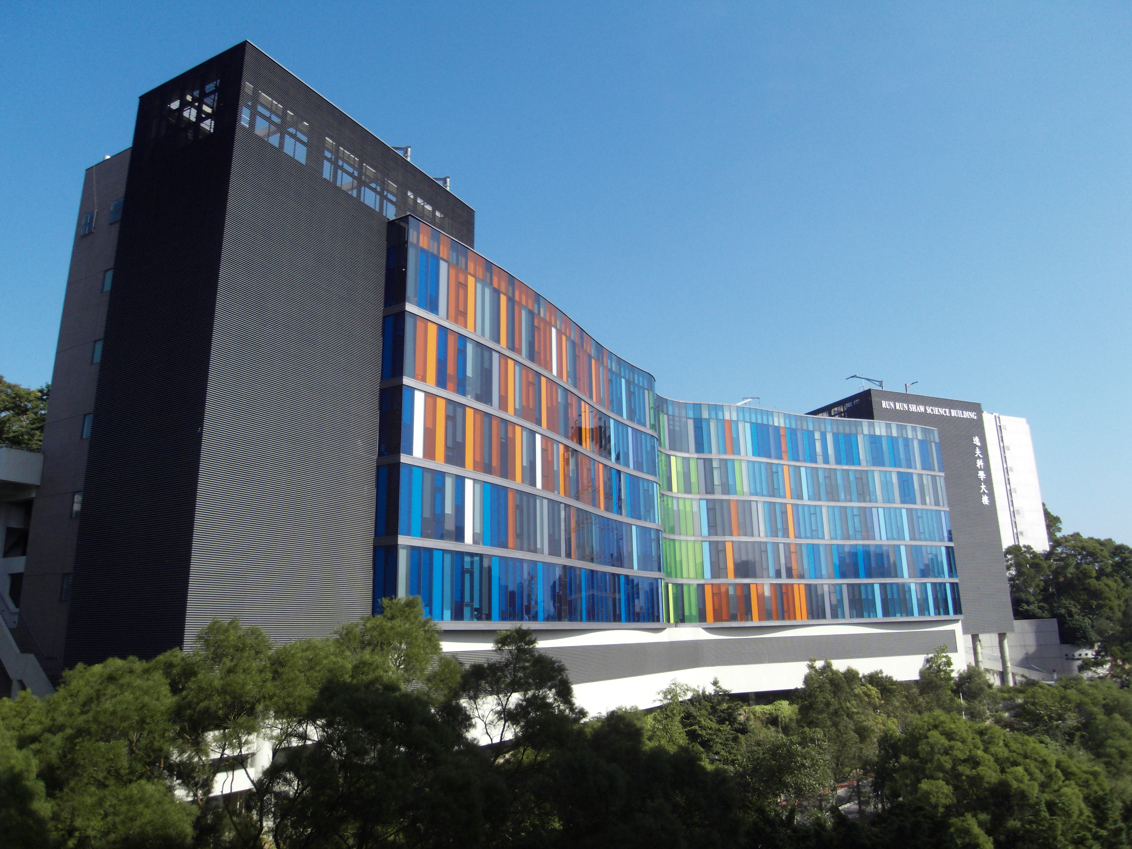 香港中文大学逸夫科技大楼坐落于大学中央校园内，为学校科研、实验所用。